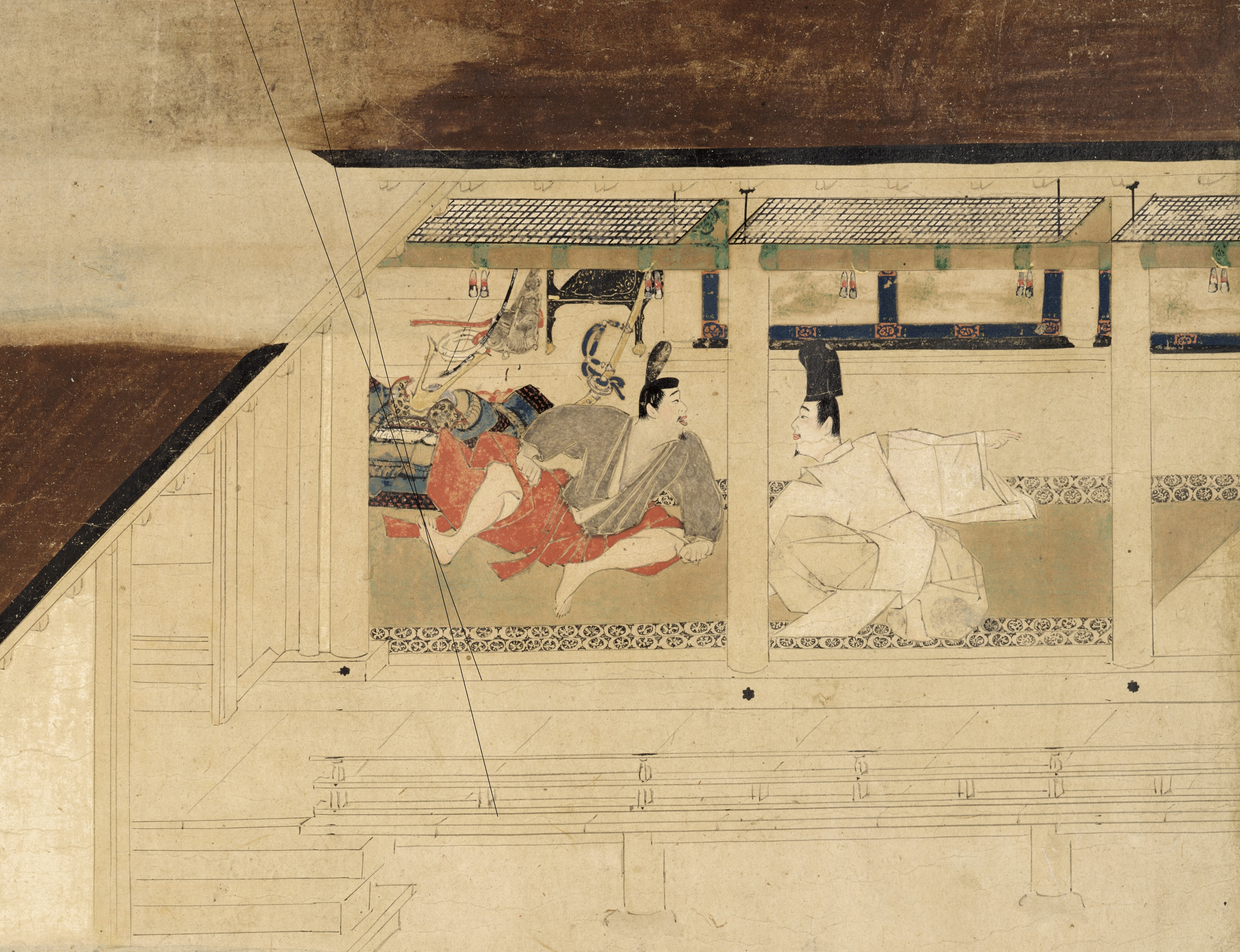 Dans la chambre de l'empereur, Fujiwara no Nobuyori apprend la fuite de Nijô.